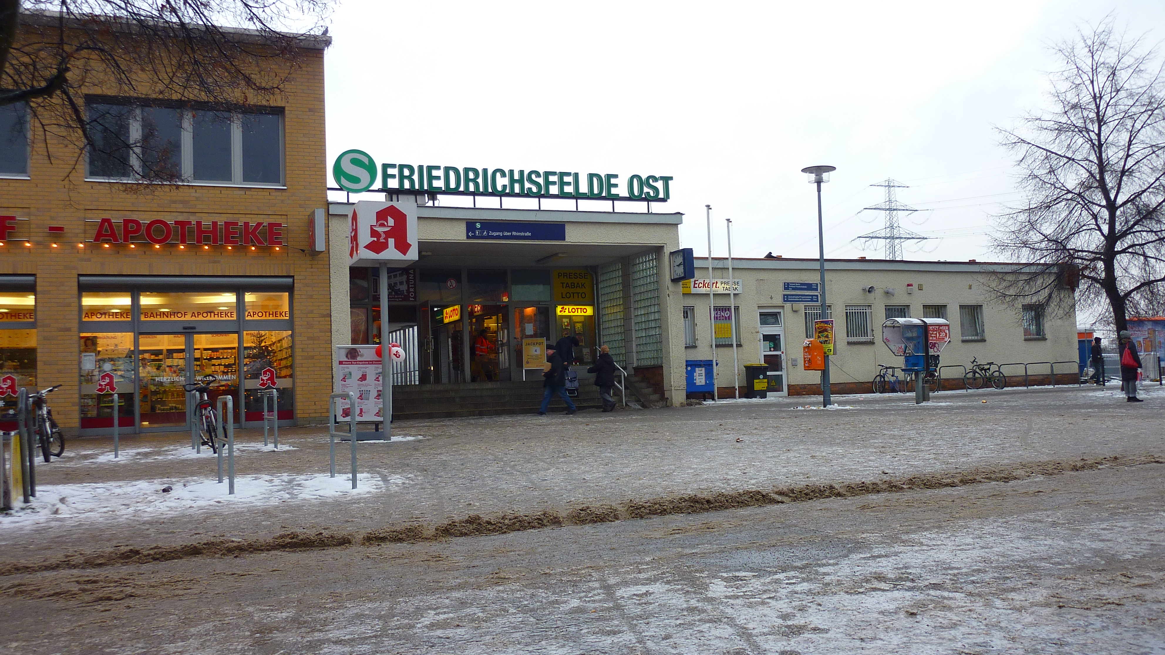 Zugang zum S-Bahnhof Friedrichsfelde Ost, Seddiner Straße